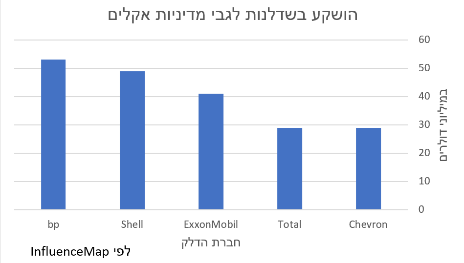 כמות הכסף שהושקעה מאז הסכם פריז בשדלנות ומיתוג עצמי הקשור באקלים ע"י חמש חברות הדלק הגדולות. הגרף מבוסס על מידע מהדו"ח של InfluenceMap